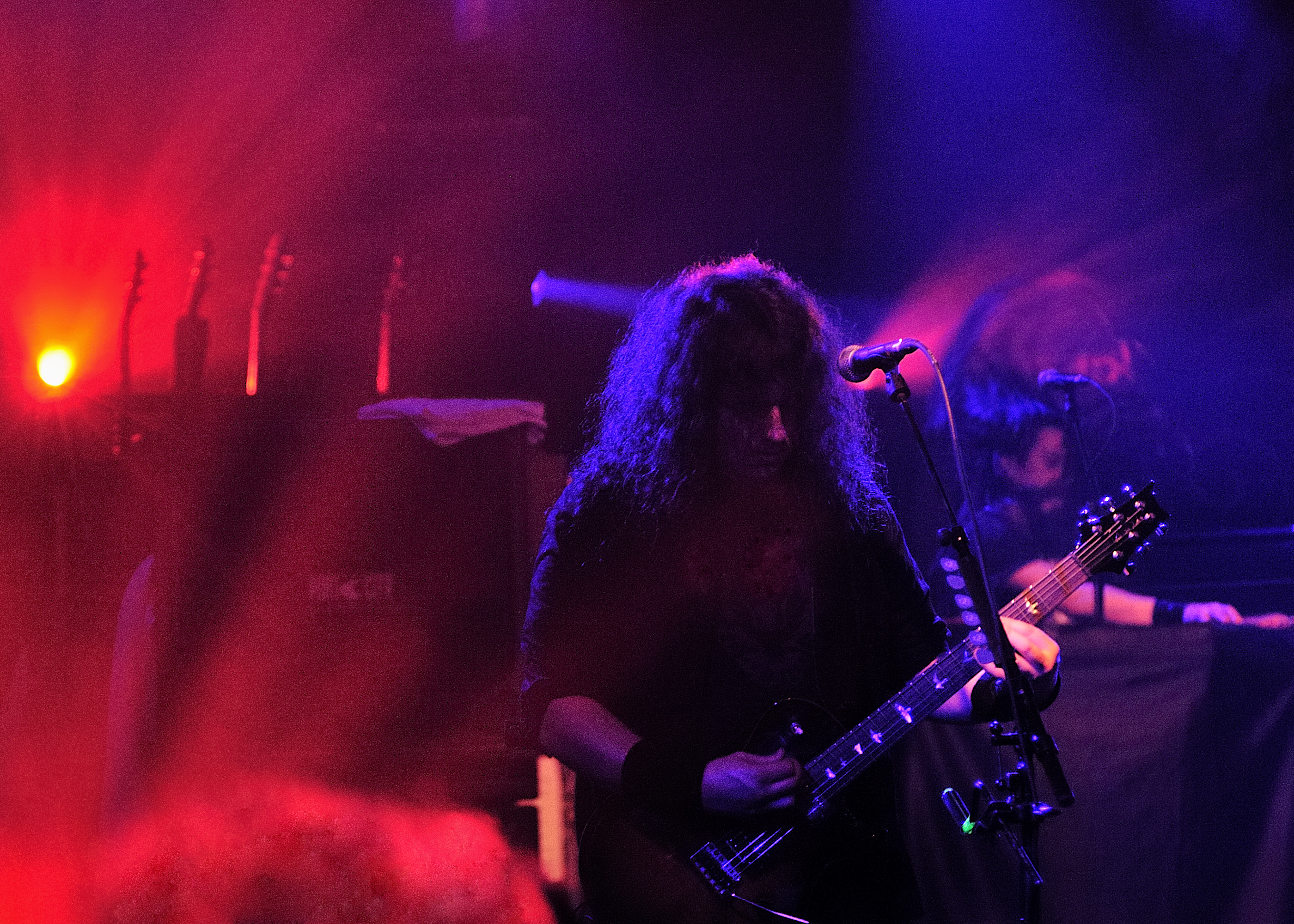 Opeth, Munich Backstage Werk, Saturday 6 December 2008 Fredrik Åkesson, Per Wiberg